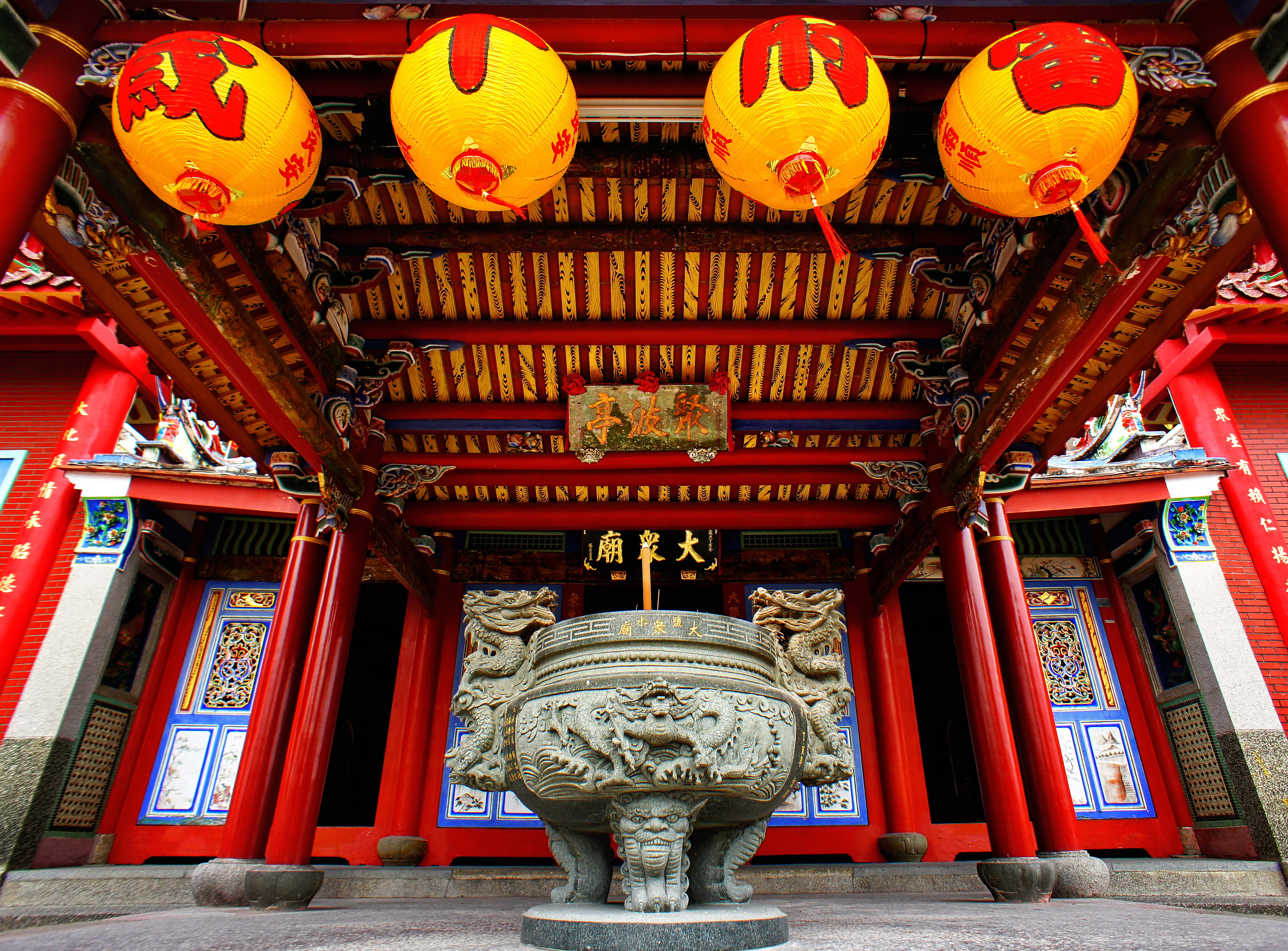 臺南市月津港聚波亭